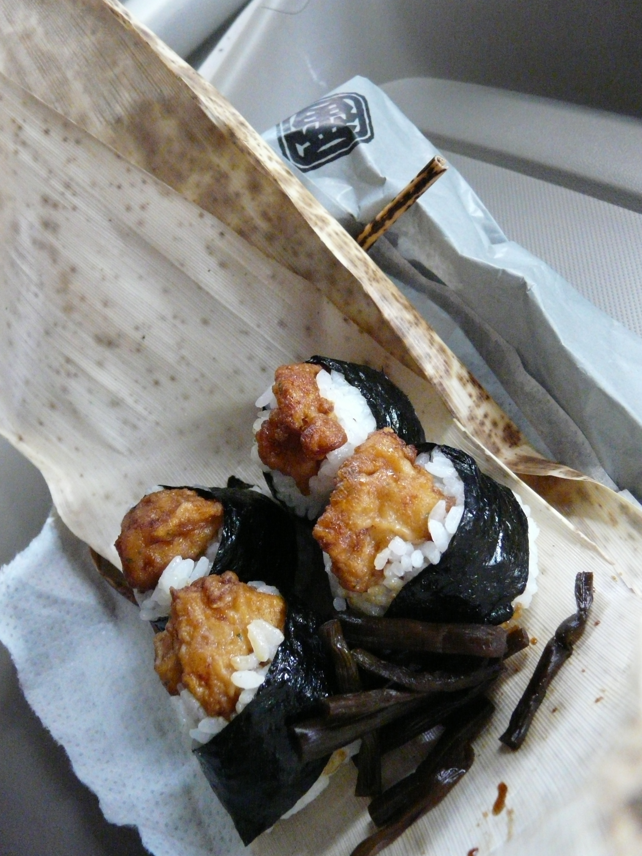 天むす（名古屋市東区徳川1-739 に本社がある「地雷也」[1]の天むす）